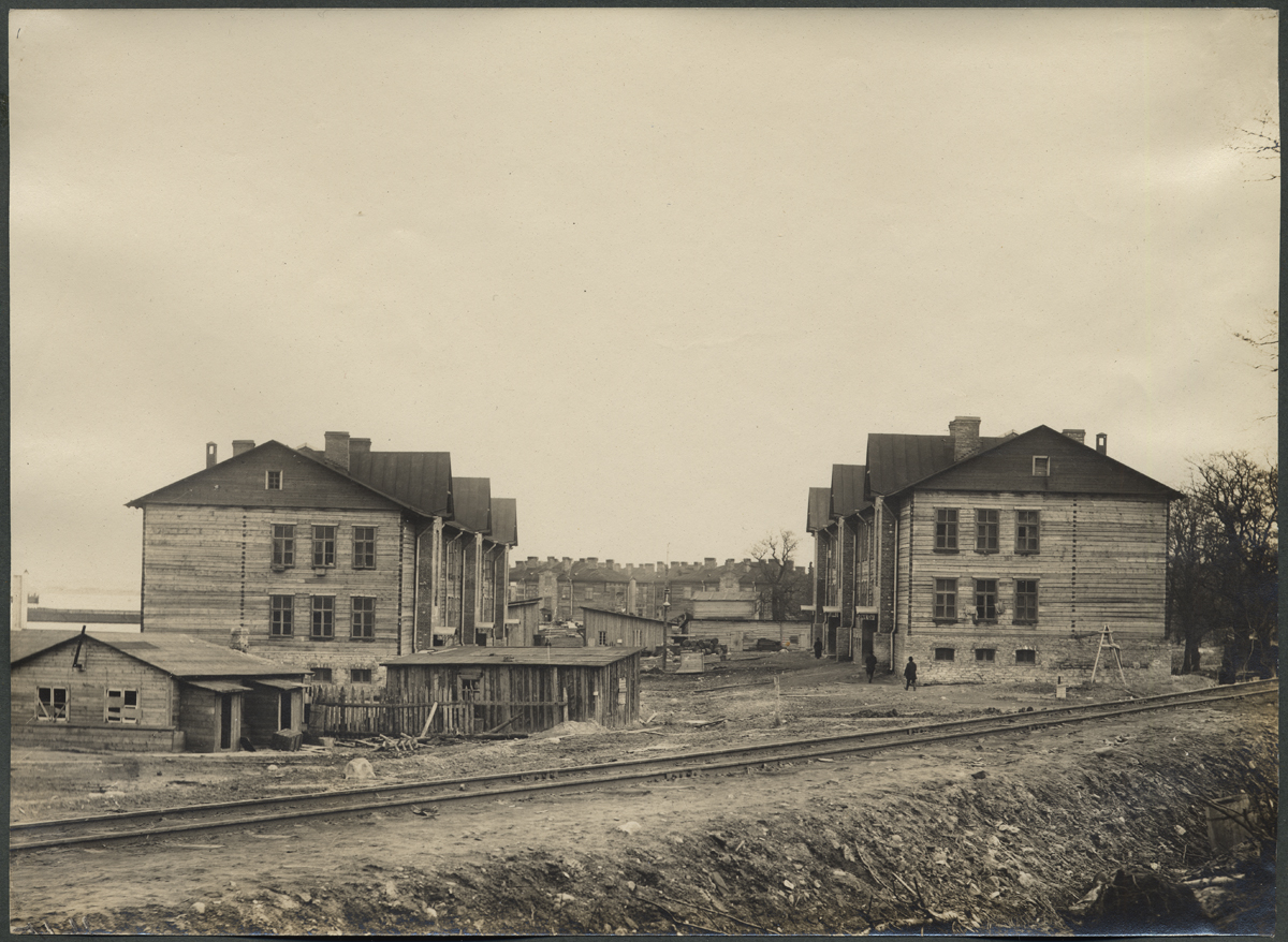 Vene-Balti laevatehas, elurajoon This image on geotagging crowdsourcing platform Ajapaik